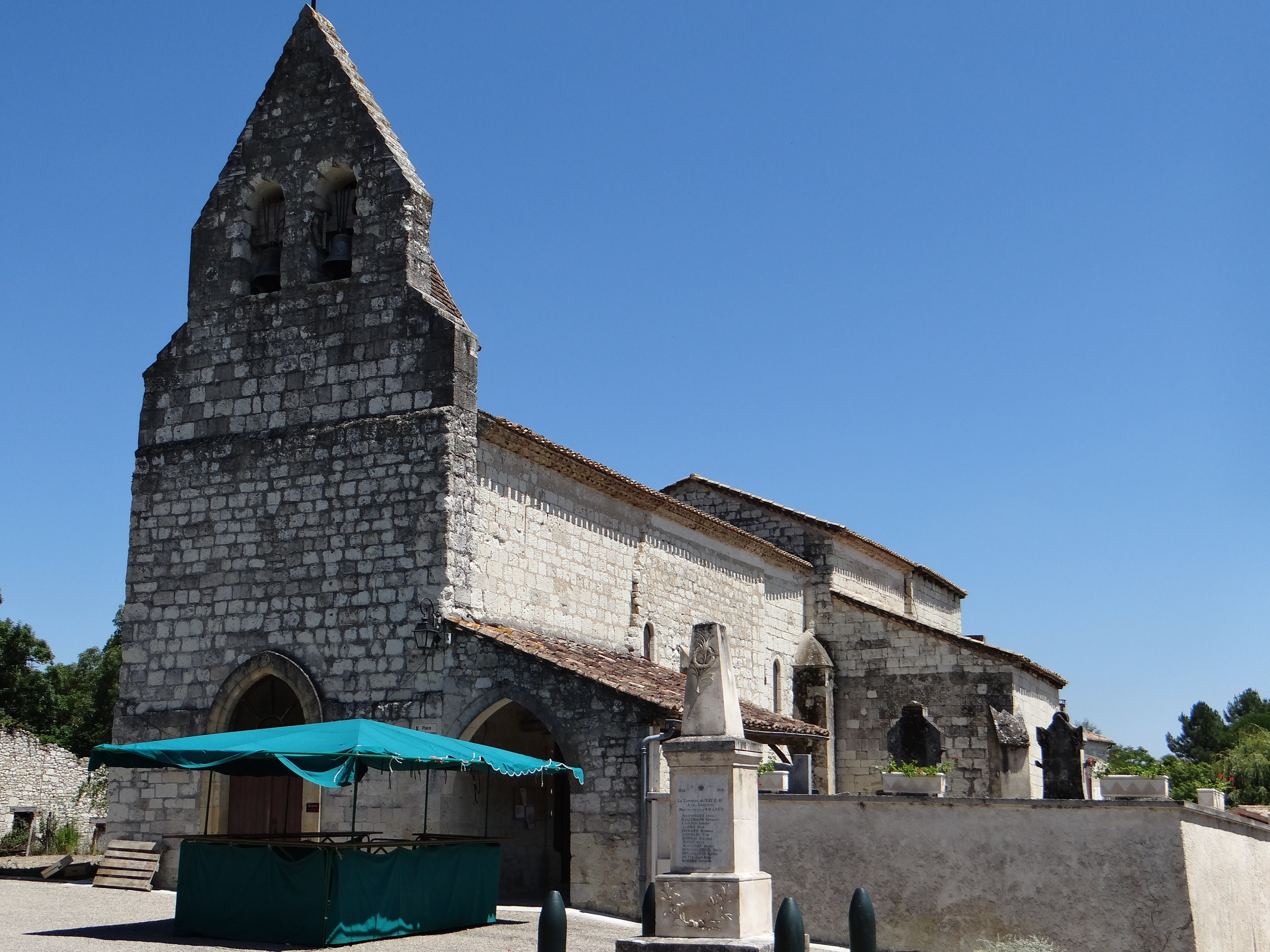 Tayrac - Église Saint-Amans - Clocher, côté sud et monument aux morts